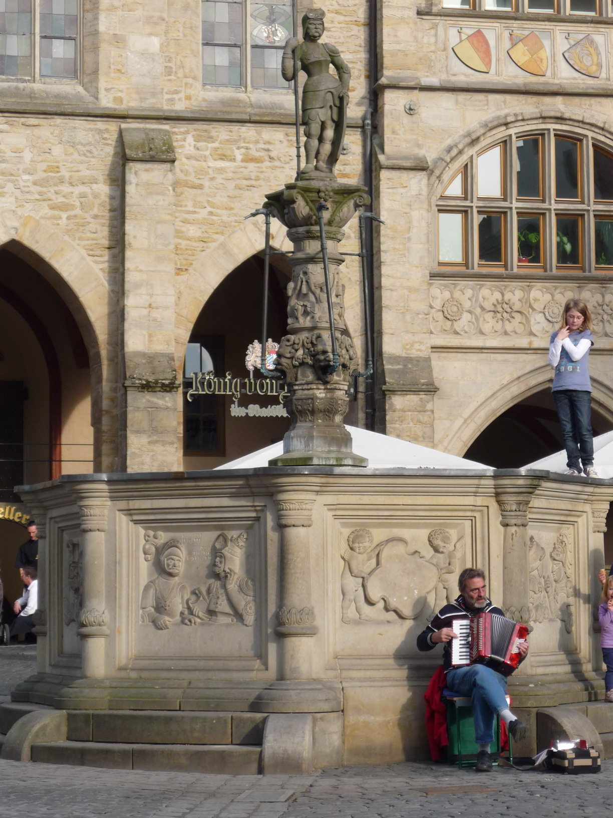 Rolandsbrunnen auf dem historischen Marktplatz in Hildesheim vor dem Rathaus, Akkordeonist: Volker Hoffmann